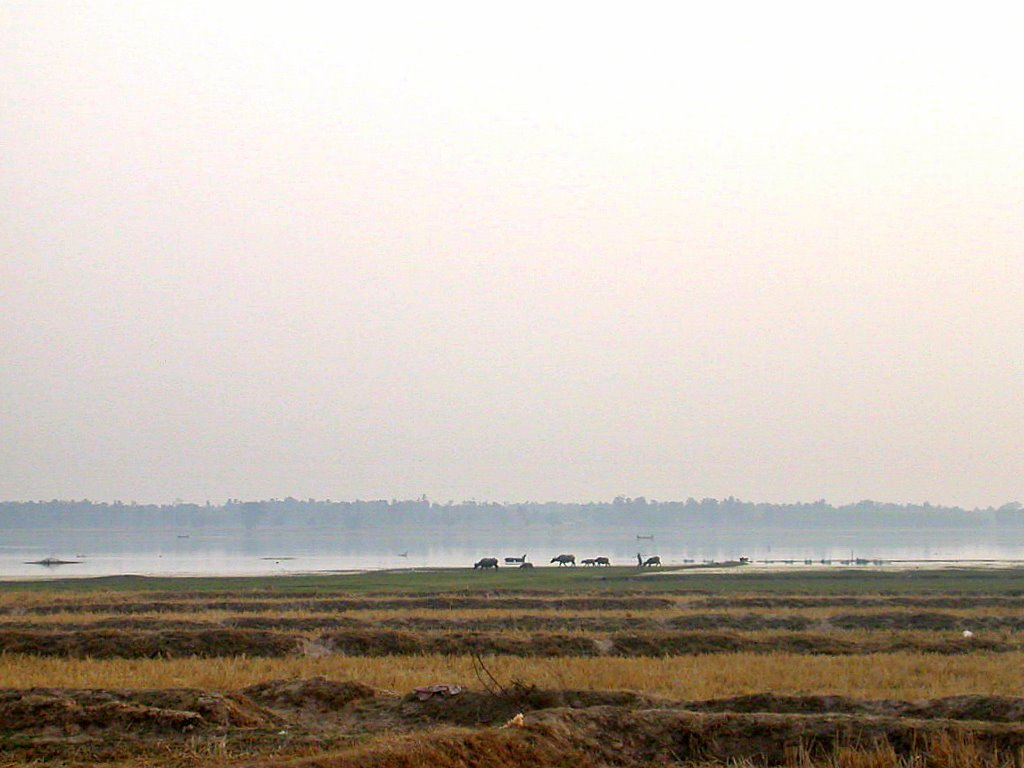 ทุ่งนาในภาคอีสาน ประเทศไทย (forgotten place)